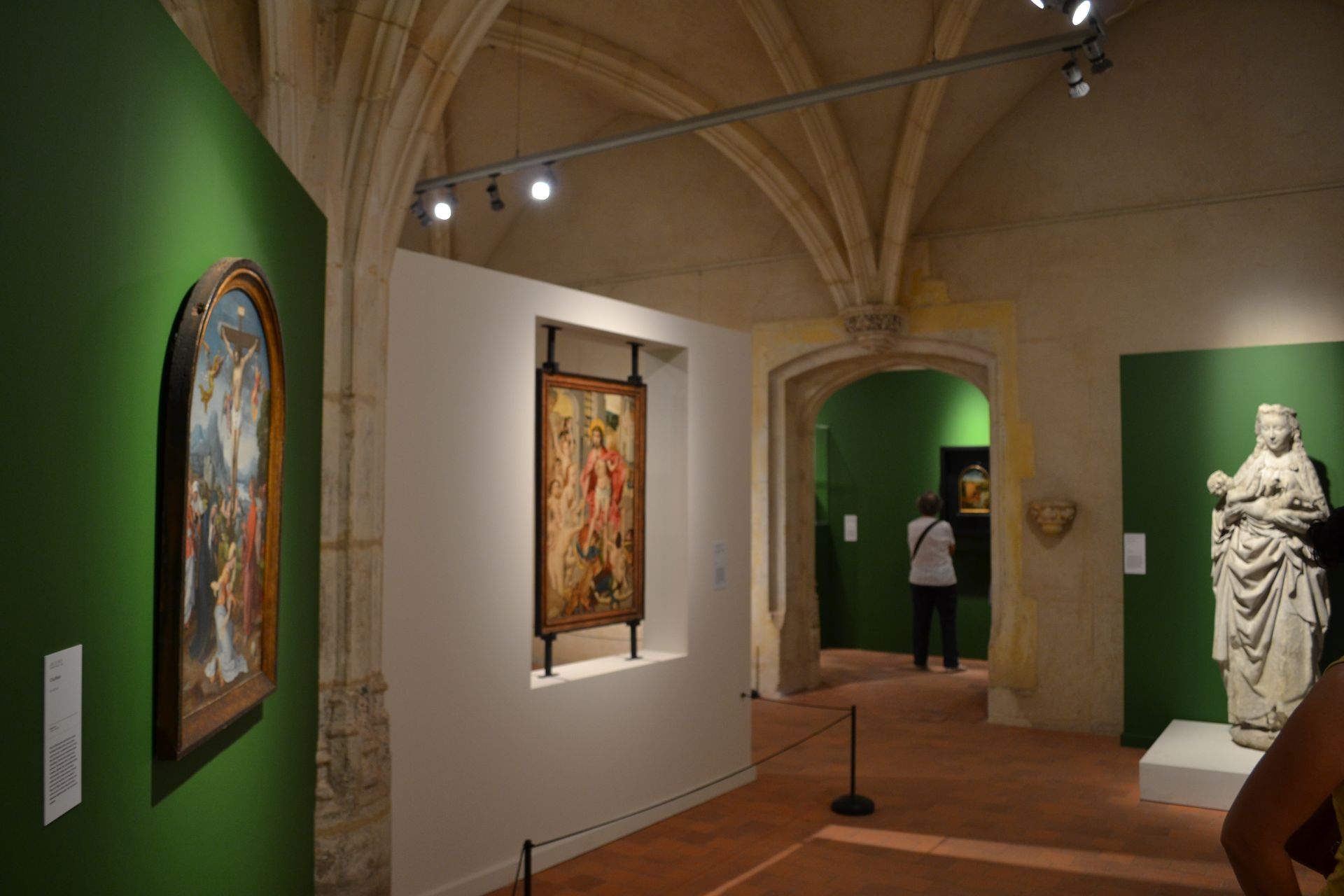 Aperçu de la scénographie de l'exposition"Primitifs flamands. Trésors de Marguerite d'Autriche" au Monastère de Brou à Bourg-en-Bresse (France) en 2018